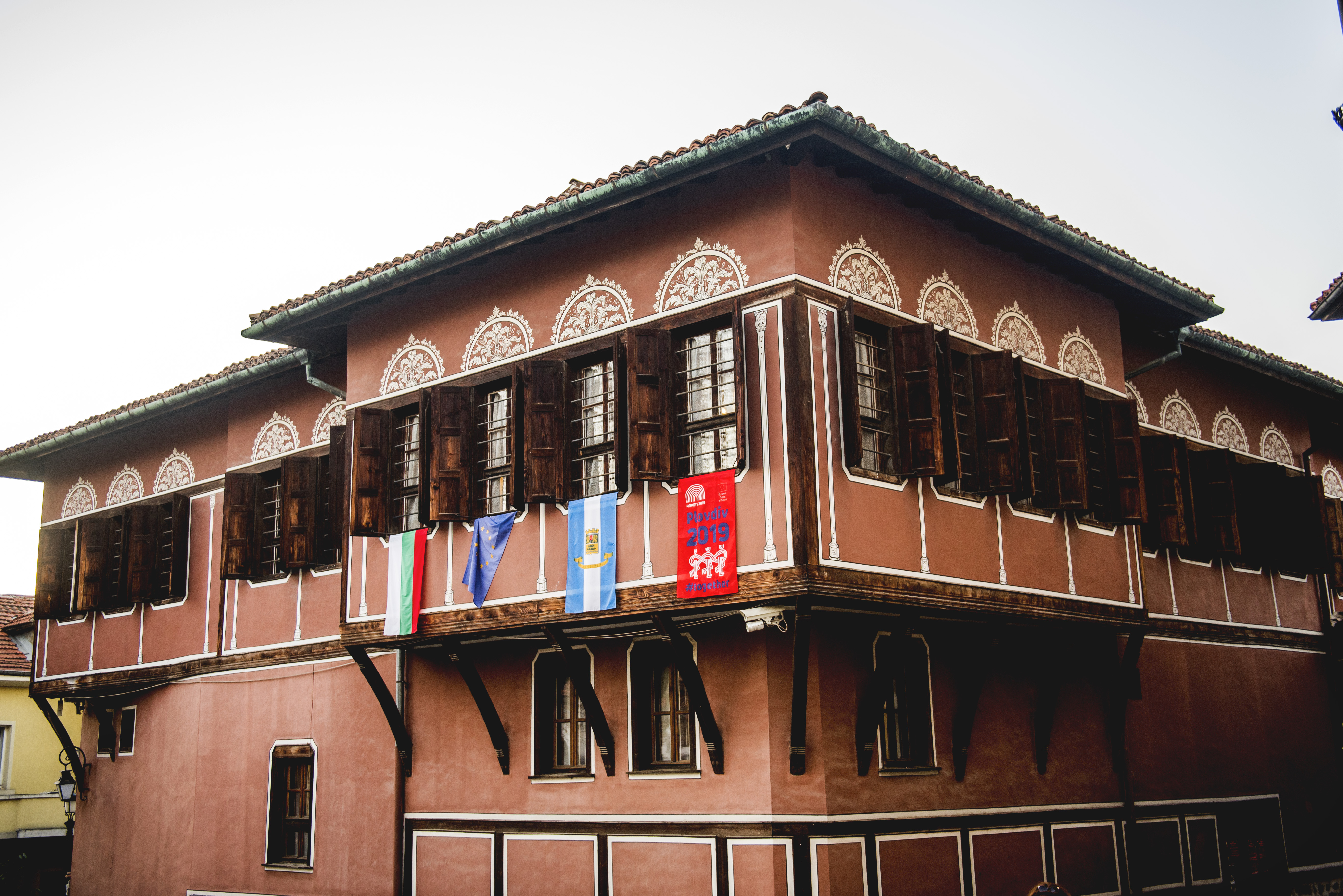 Балабановата къща в град Пловдив е съборена до основи през 30-те години. Домът на Хаджи Лампша е възстановен през 70-те години на ХХ в. благодарение на архитект Христо Пеев.